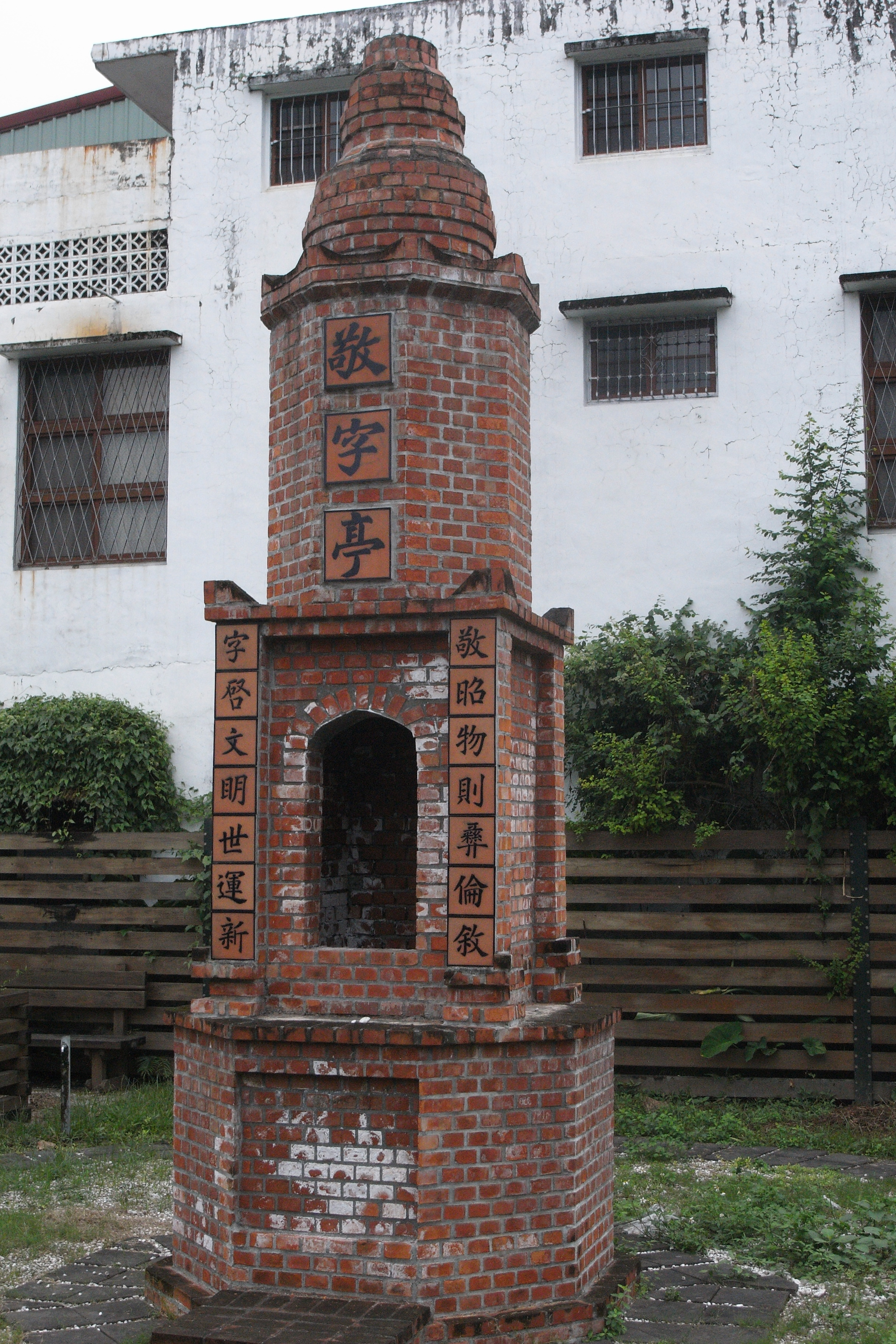 中文（香港）: 敬字亭，攝於台灣花蓮鳳林校長夢工廠的後院，是花東地區唯一的敬字亭。